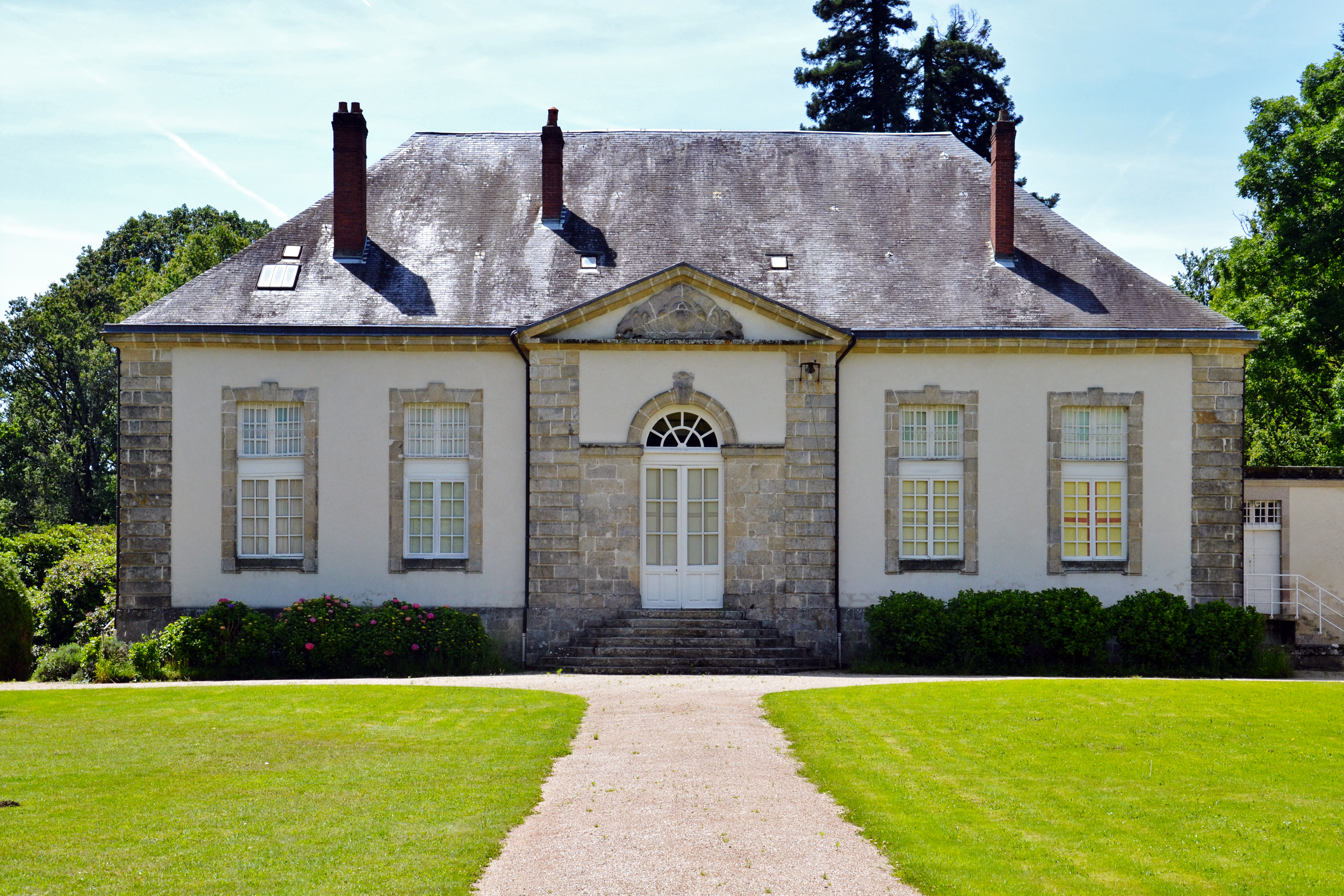 Le château de Beauvais, près de Landouge, sur la commune de Limoges (Haute-Vienne, France).